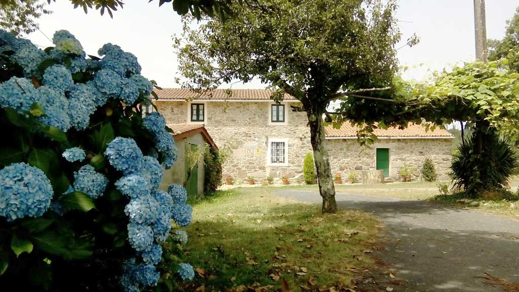 Vistado do Estando, Curtis.